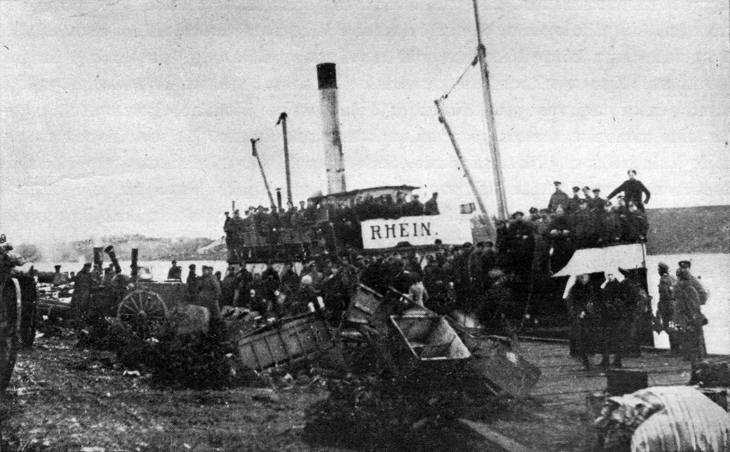 Meie 4. polgu osade laevale laadimine Narva sadamas oktoobris 1919. Polk läheb vahetama Ingeri järvede joonel asuvat 1. polku.